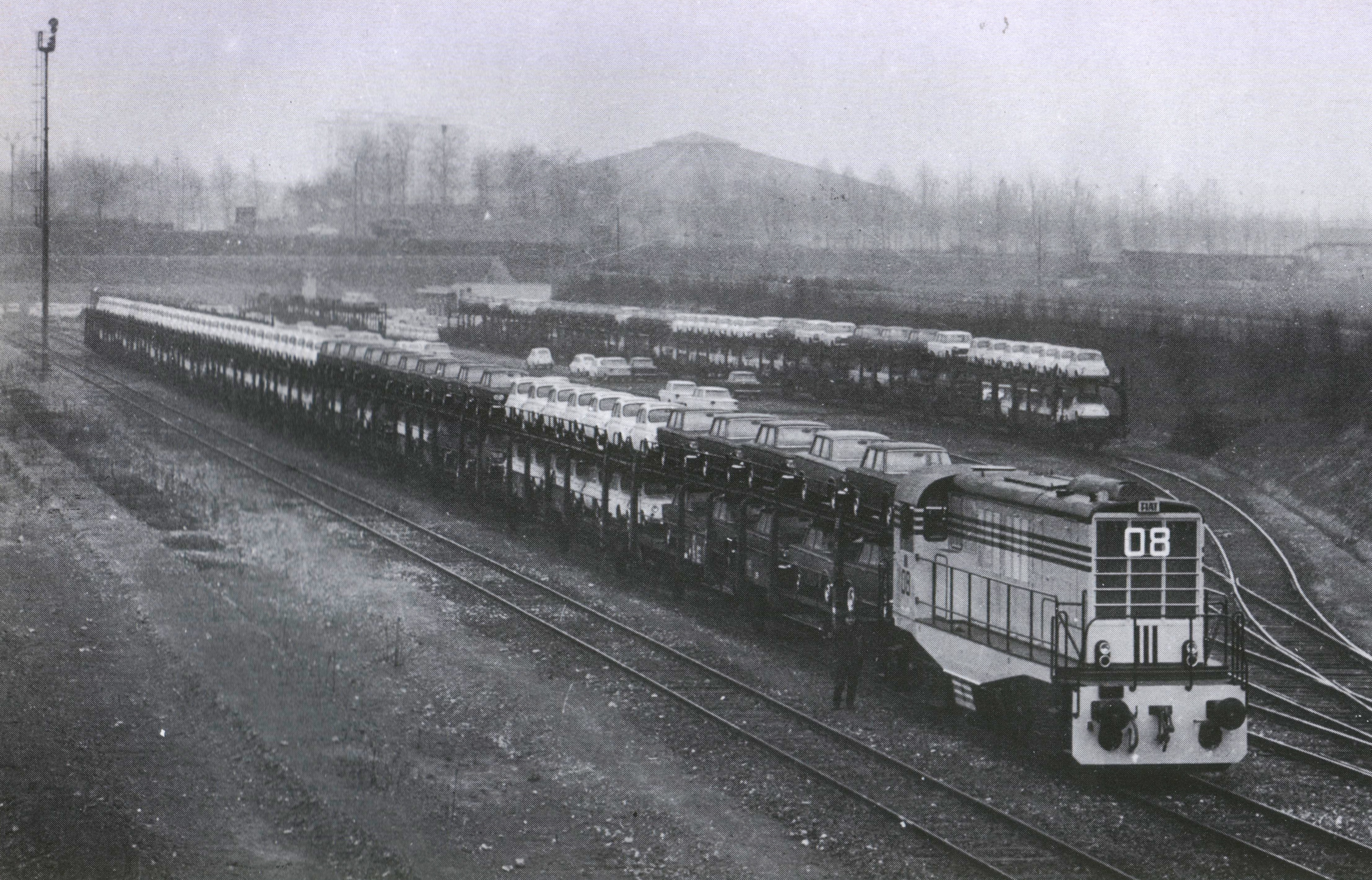 Autovetture FIAT presso lo scalo merci Torino San Paolo, 1963